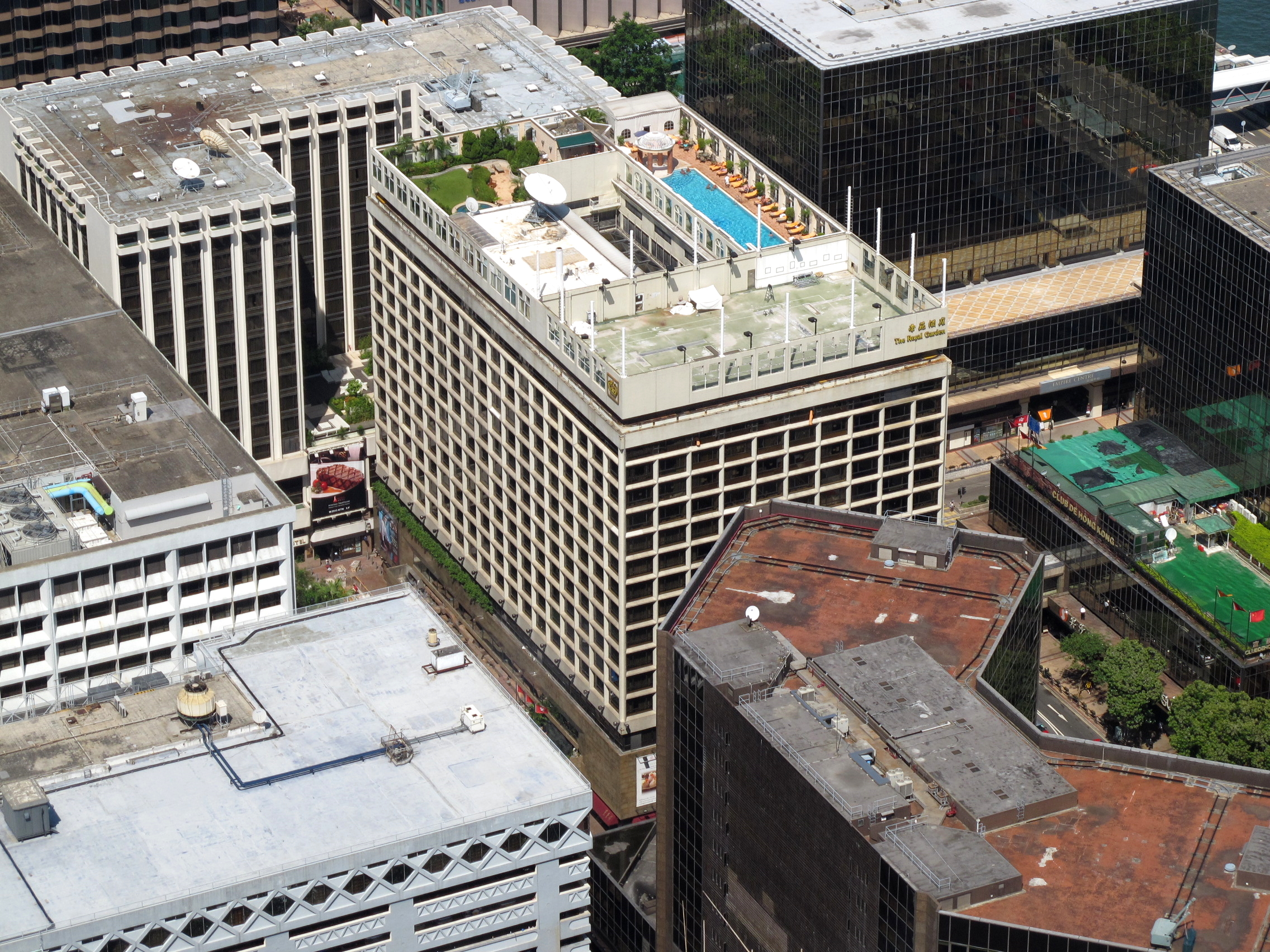 Royal Garden Hotel